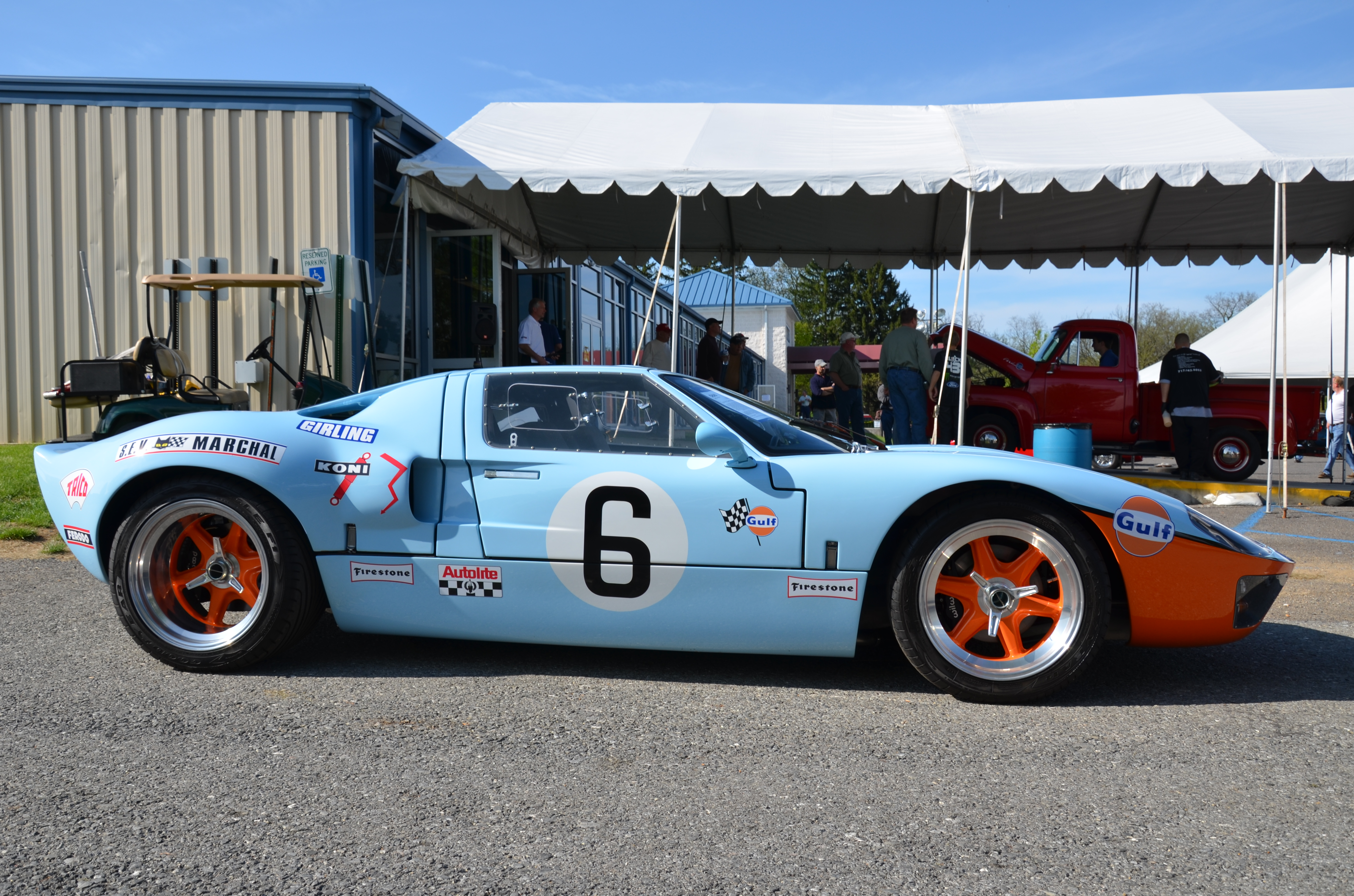 GT40